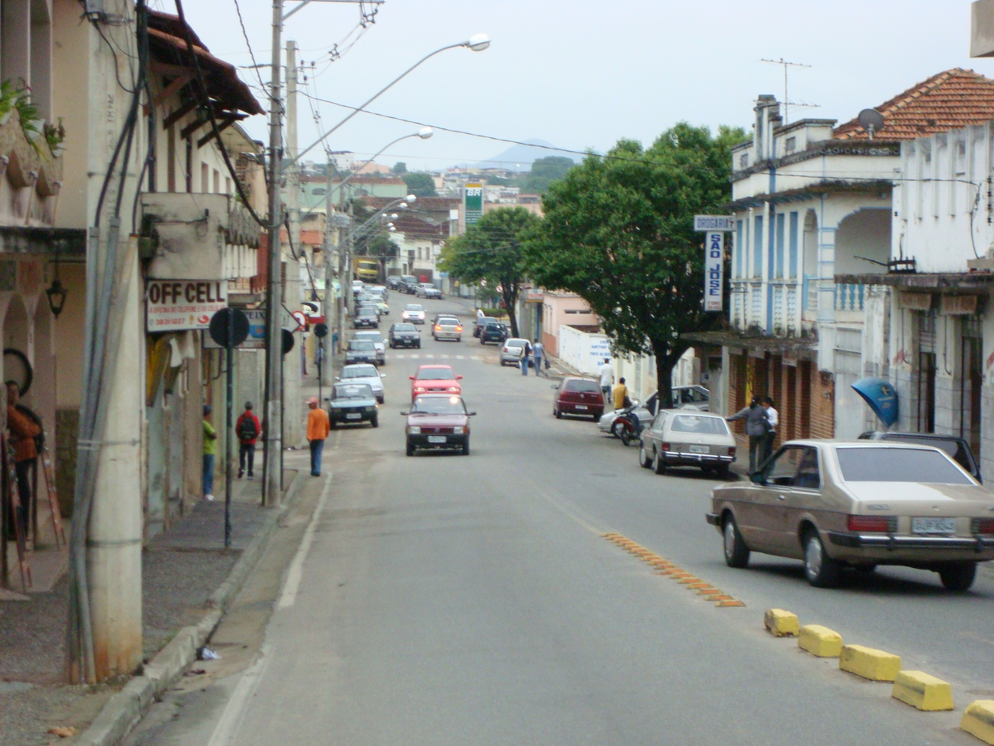 rua floreano peixoto